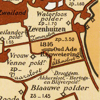 Drooggemaakte_Akkersloot-,_Hertogs-_en_Blijverspolders